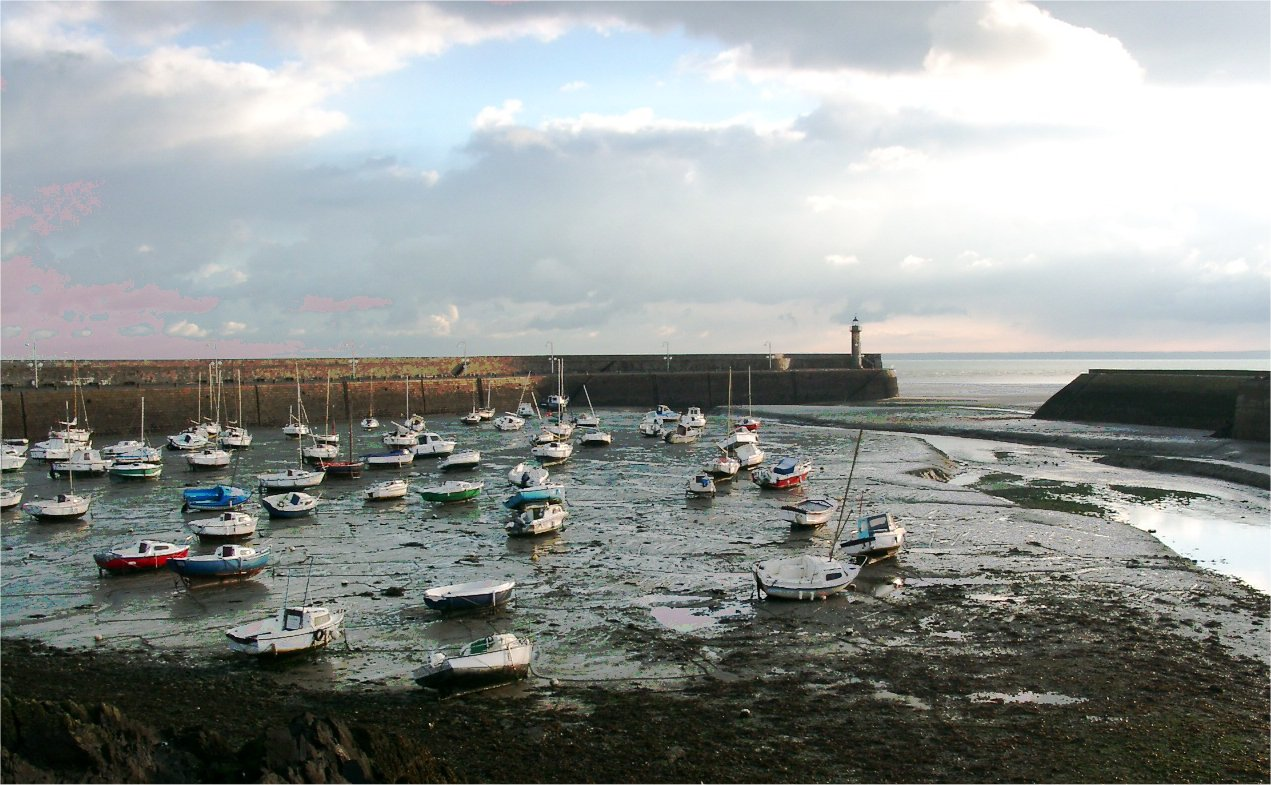 L'avant-port de Binic à marée basse